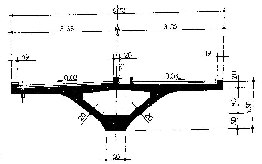 coupe du caisson de la passerelle de Meylan